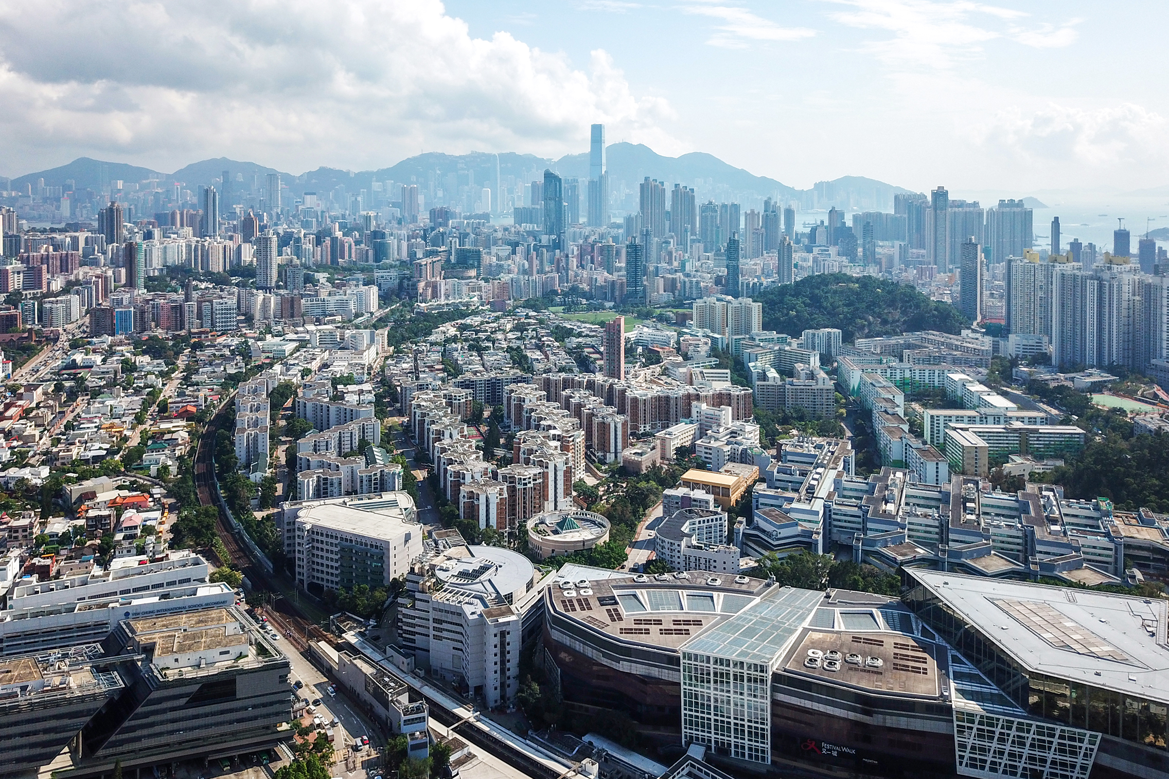 Yau Yat Tsuen